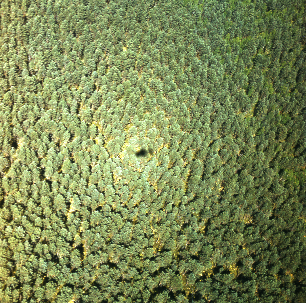 Opositsiooniefekt männimetsa kohal.